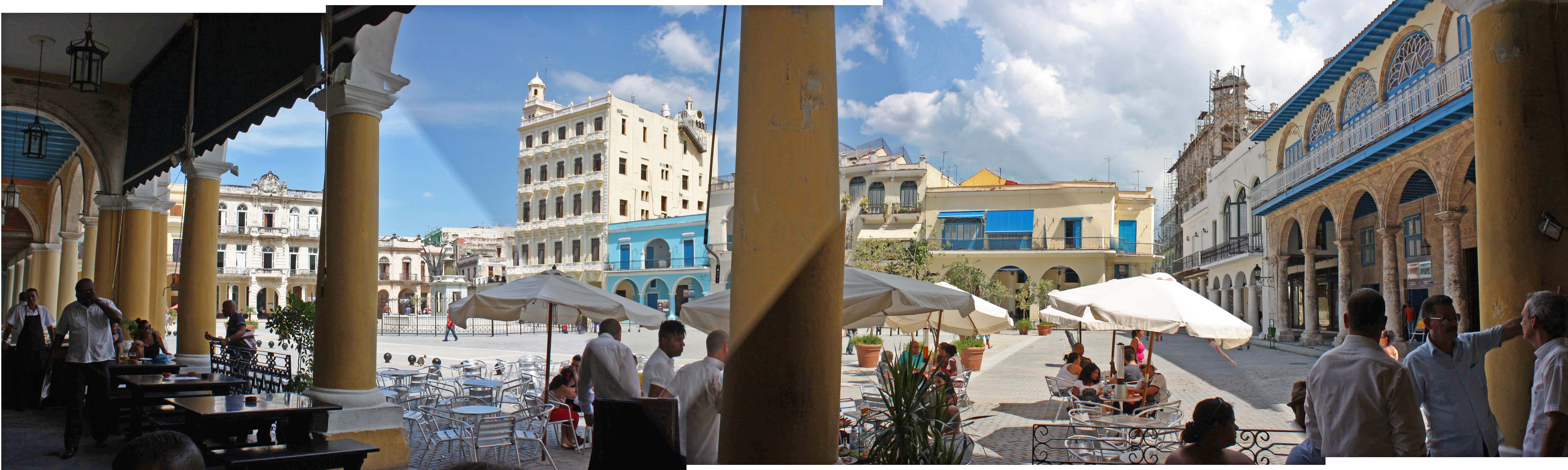 Havana, Cuba